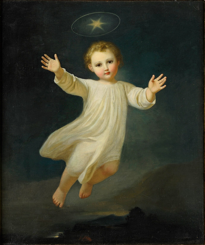 Das Christuskind. Öl auf Leinwand, 70 x 58 cm